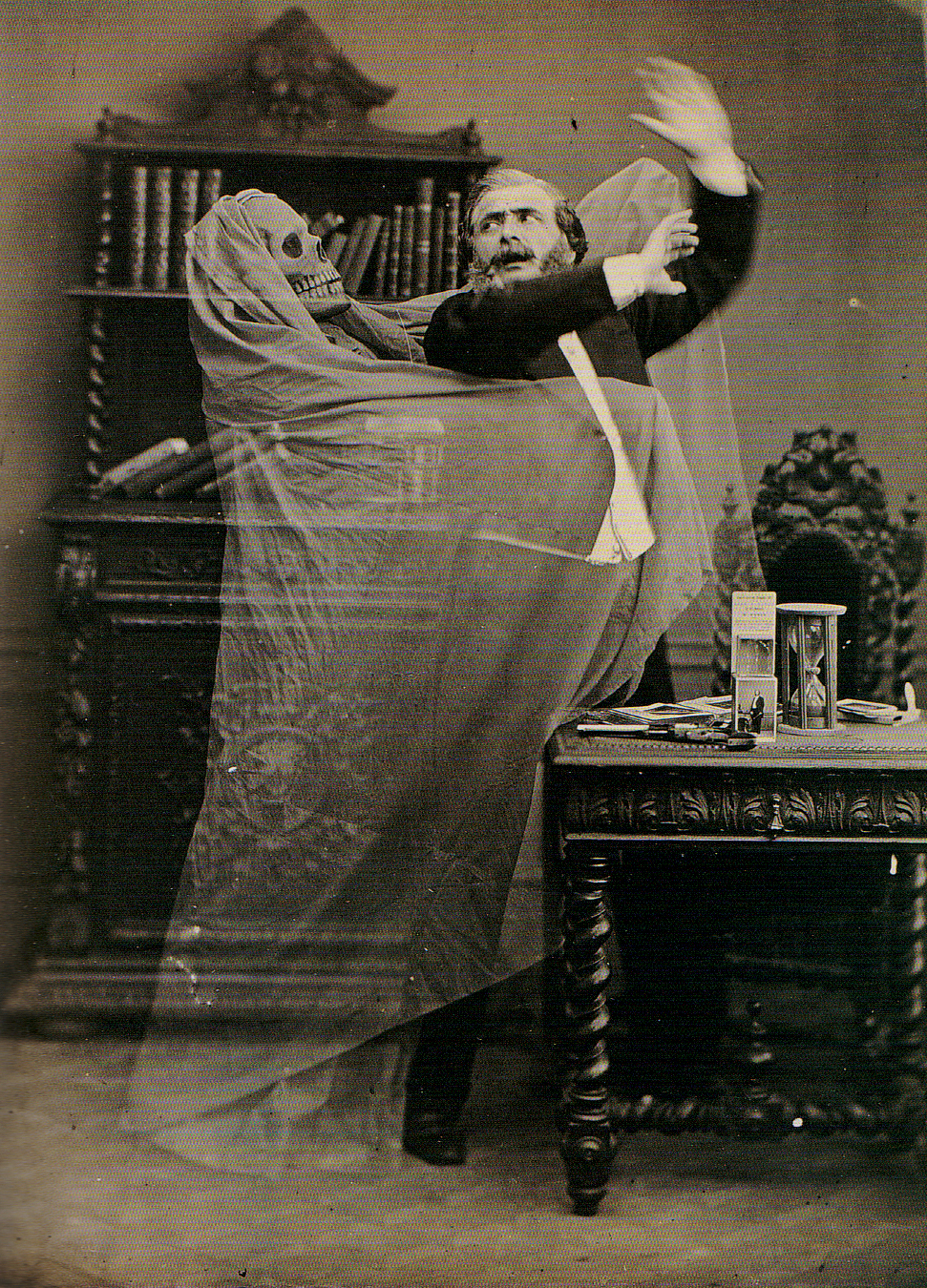 Photographie publicitaire sur papier albuminé.